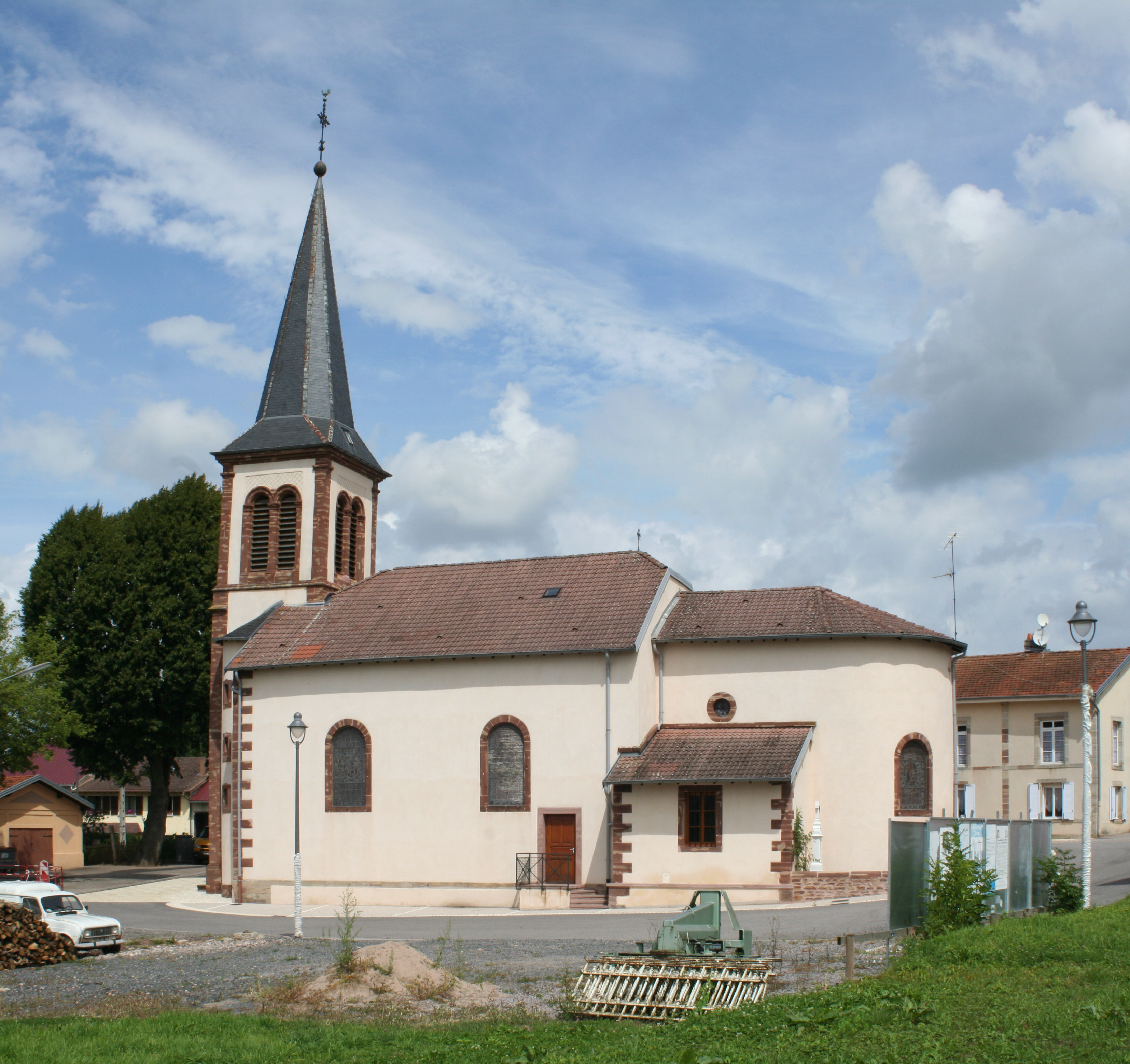 Église de Ménarmont (Vosges)